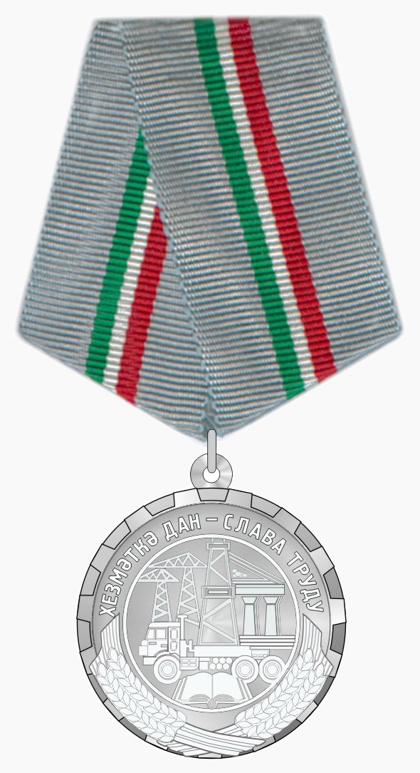 Медаль Татарстана За доблестный труд